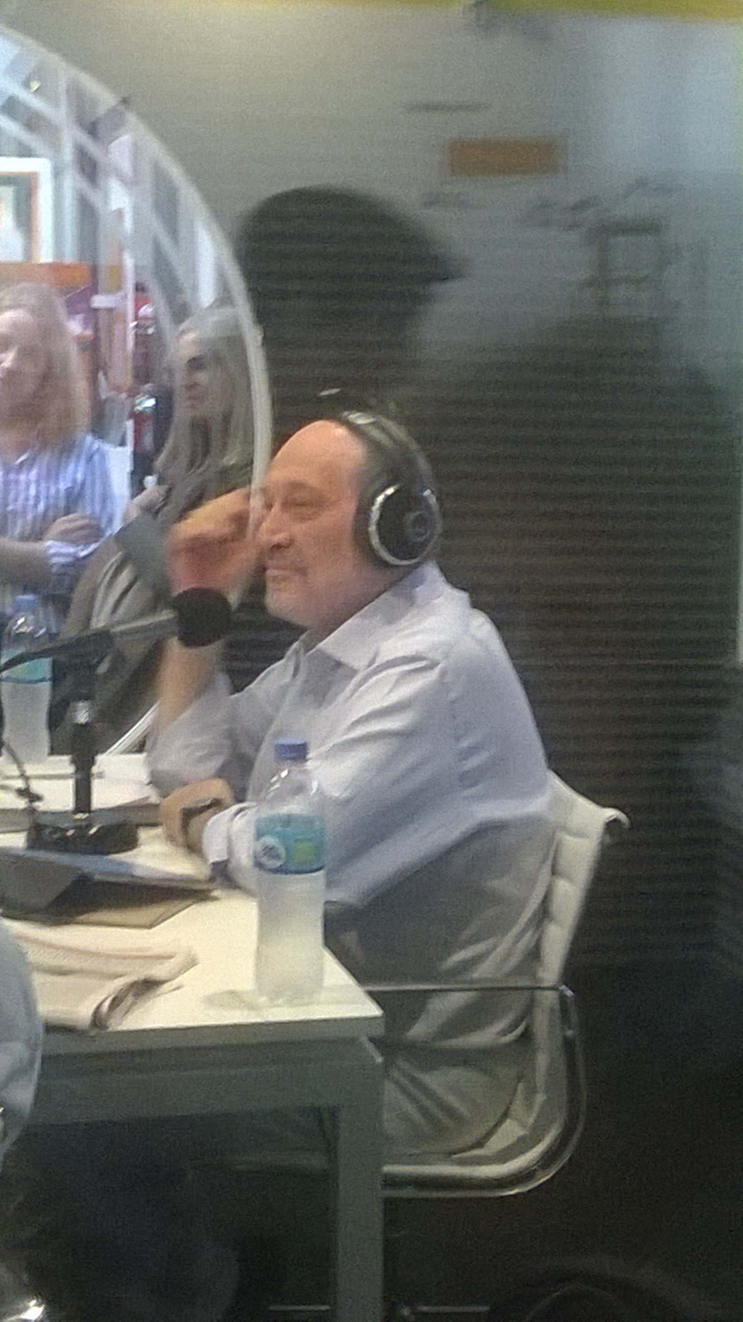 Alfredo Leuco en los estudios de Radio Mitre en La Rural, durante la 42.ª Feria Internacional del Libro de Buenos Aires.